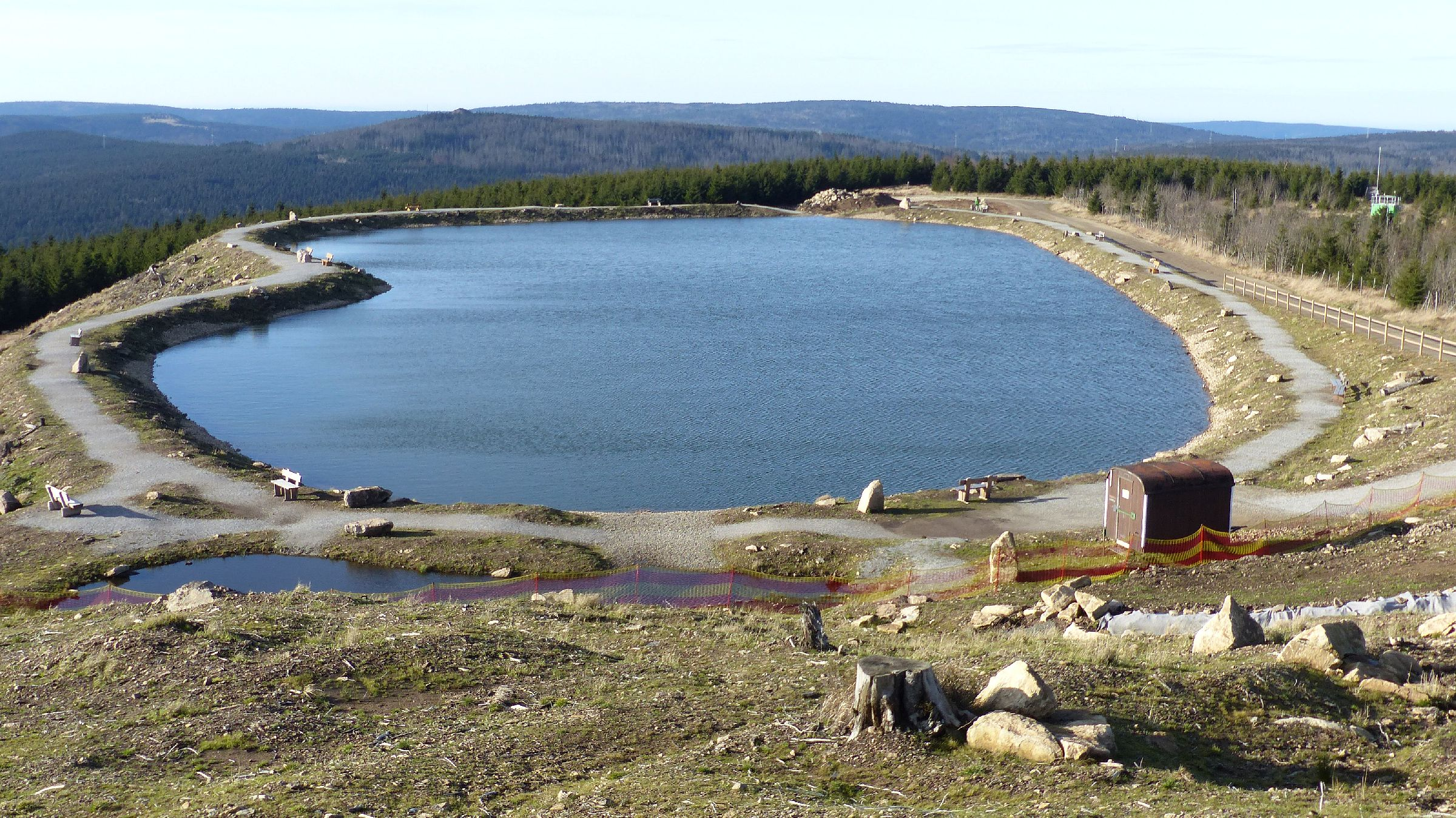 Der Schneisee auf dem Wurmberg ein Jahr nach seiner Fertigstellung im November 2014